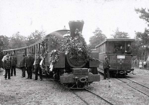 Tågmöte vid Triangeln. Till vänster lok nr 2 "Helsingborg" med tåg från Ramlösa till Helsingborg och till höger tåg mot Råå, smyckade med lövruskor en midsommarafton omkring sekelskiftet 1900.